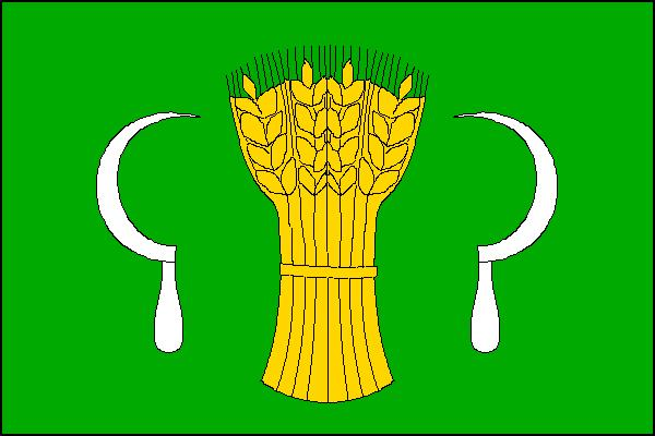 Vlajka obce Horní Bludovice